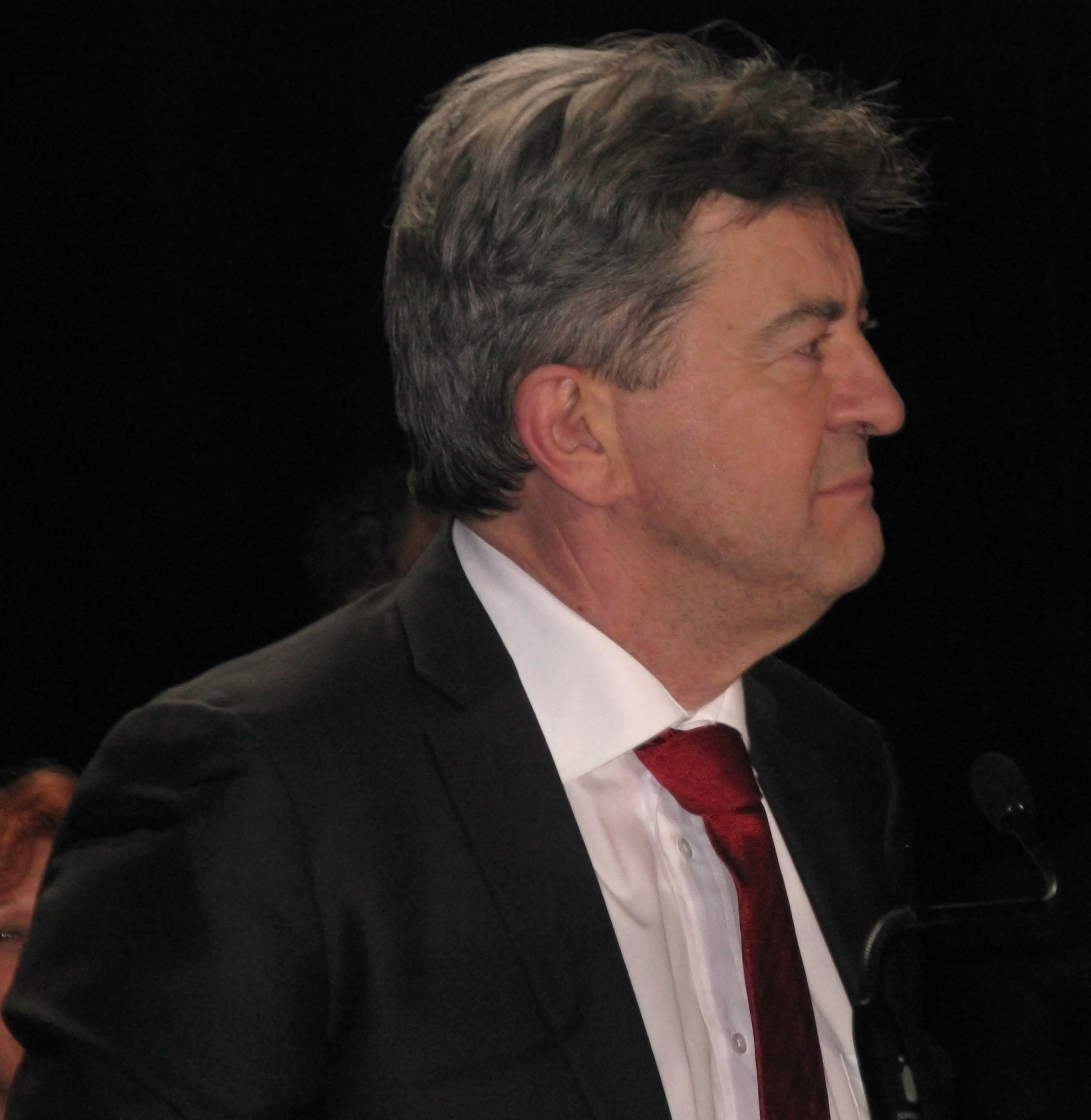 Jean-Luc Mélenchon à Paris, lors du lancement de la campagne des municipales 2014 du Front de gauche parisien.